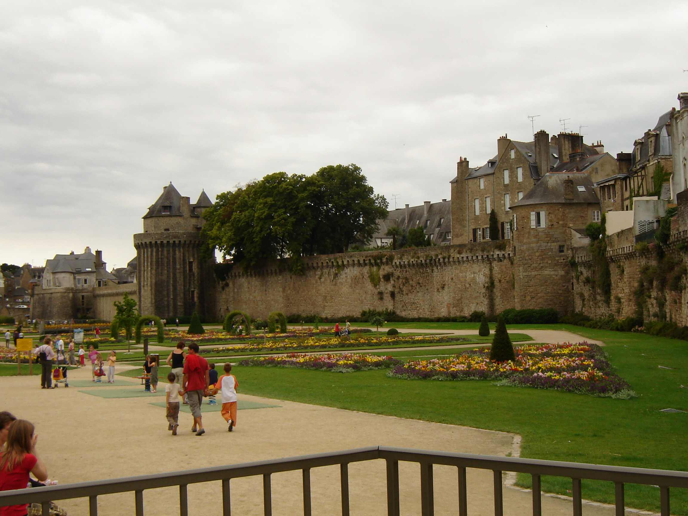 Le Jardin des Remparts, Vannes, Morbihan, France.